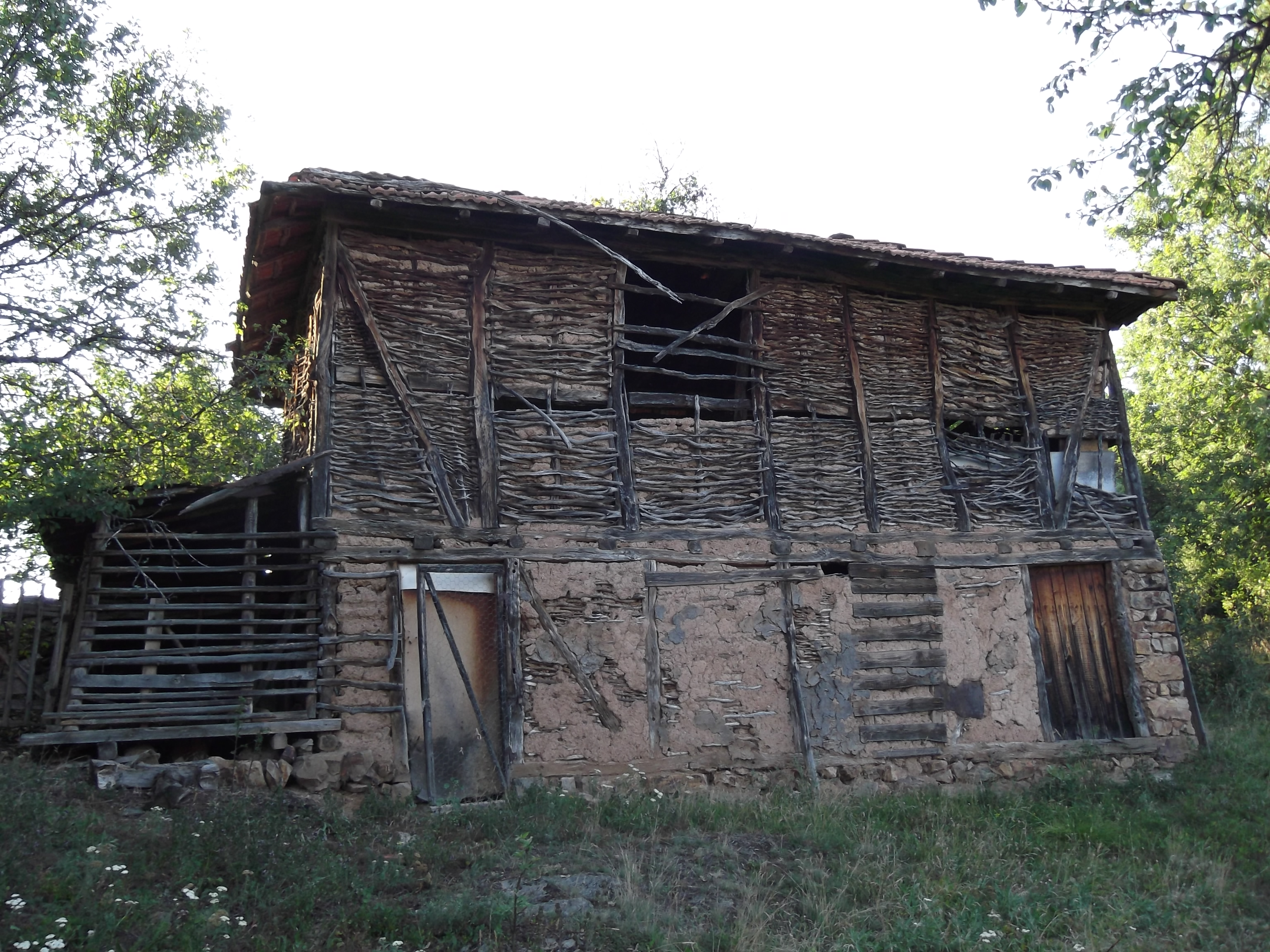 Плевня с обор в махала Попов кладенец, село Лесковдол.